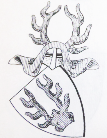 Wappen der Kastner von Schnaittenbach